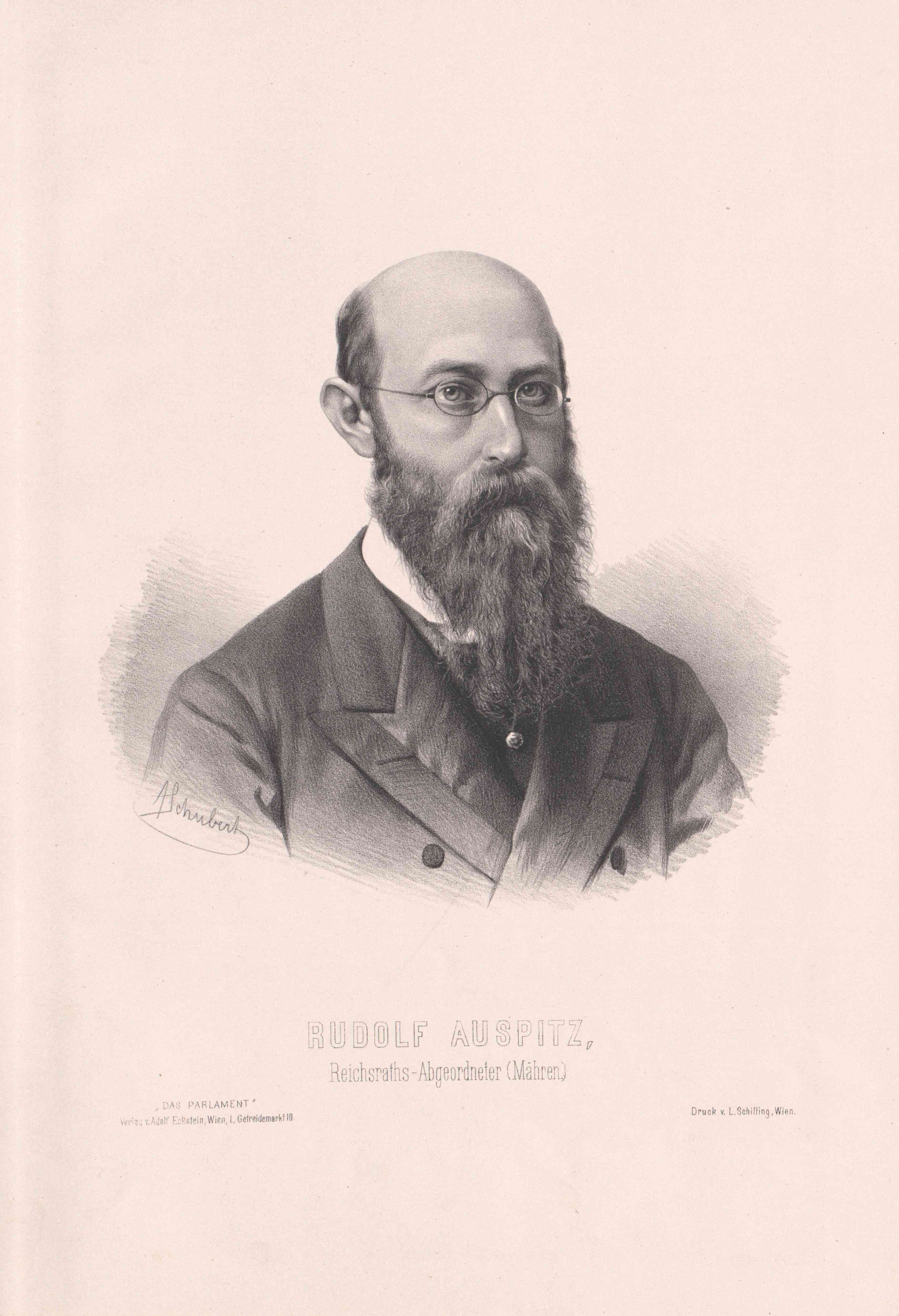 Rudolf Auspitz